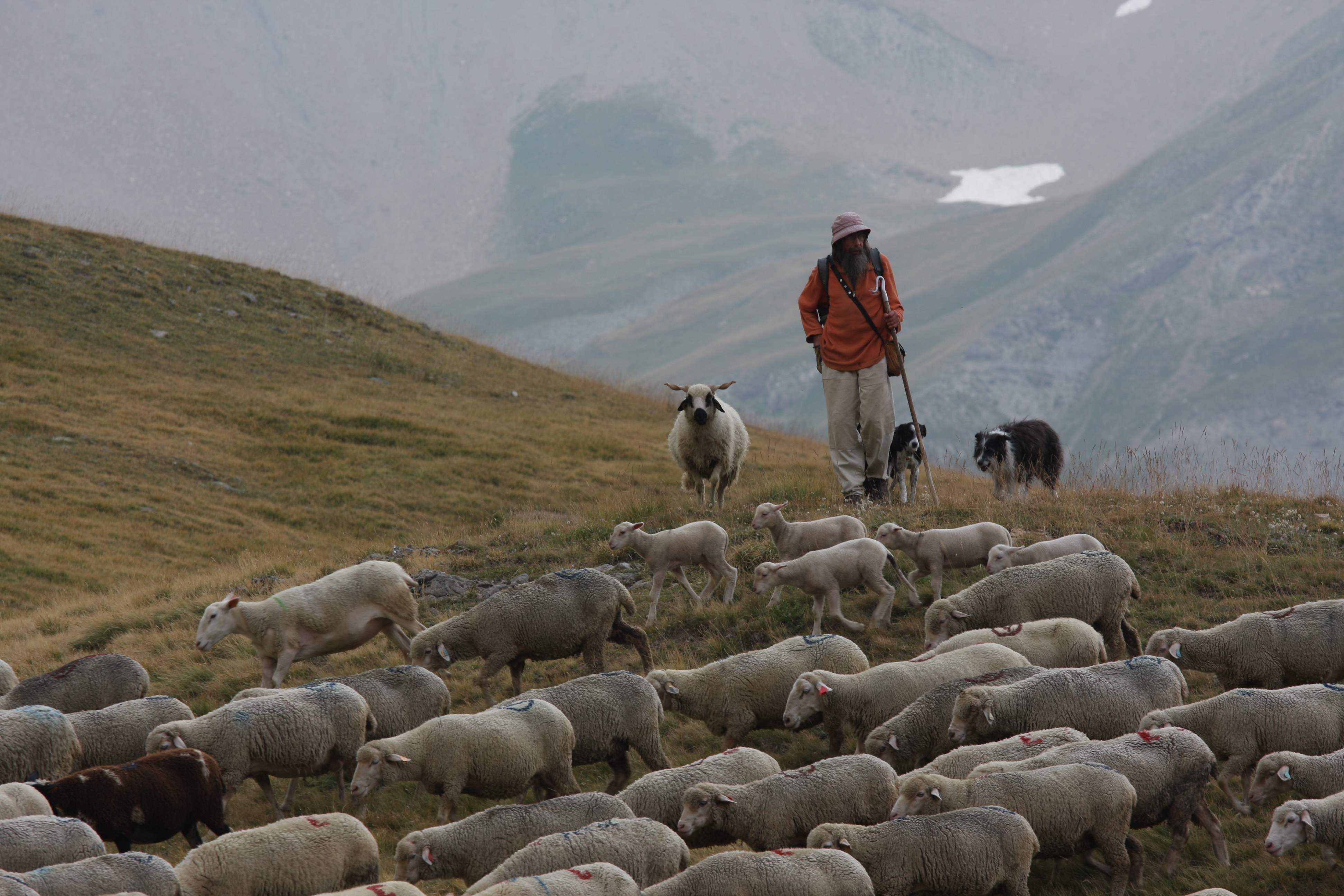 Fotografia realizzata nel contesto del progetto LIFE PastorAlp